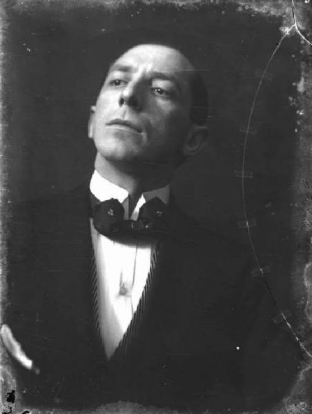 Umberto Boccioni